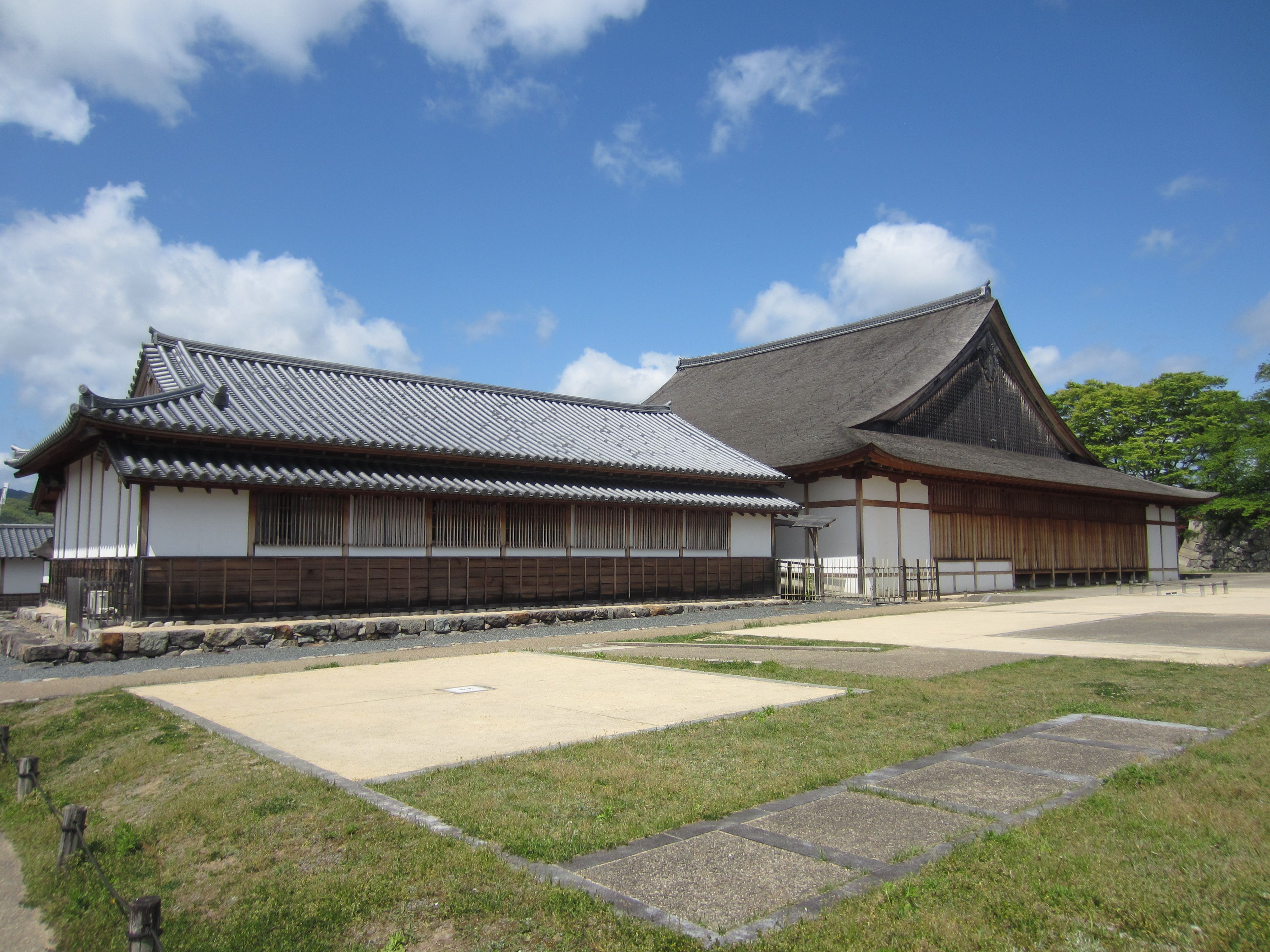 篠山城、大書院